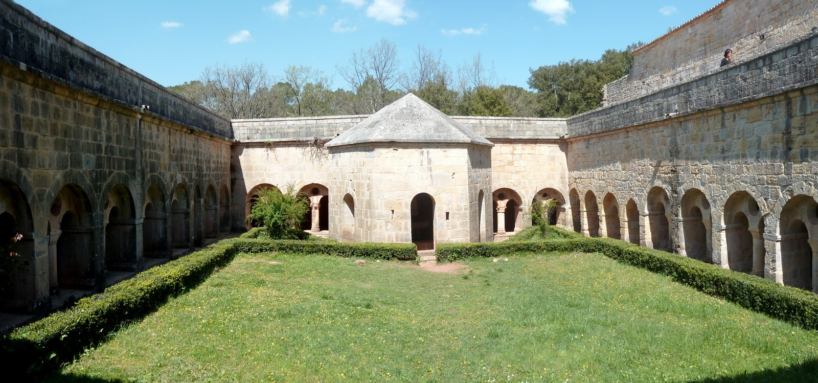 Abbaye du Thoronet - Intérieur du cloitre